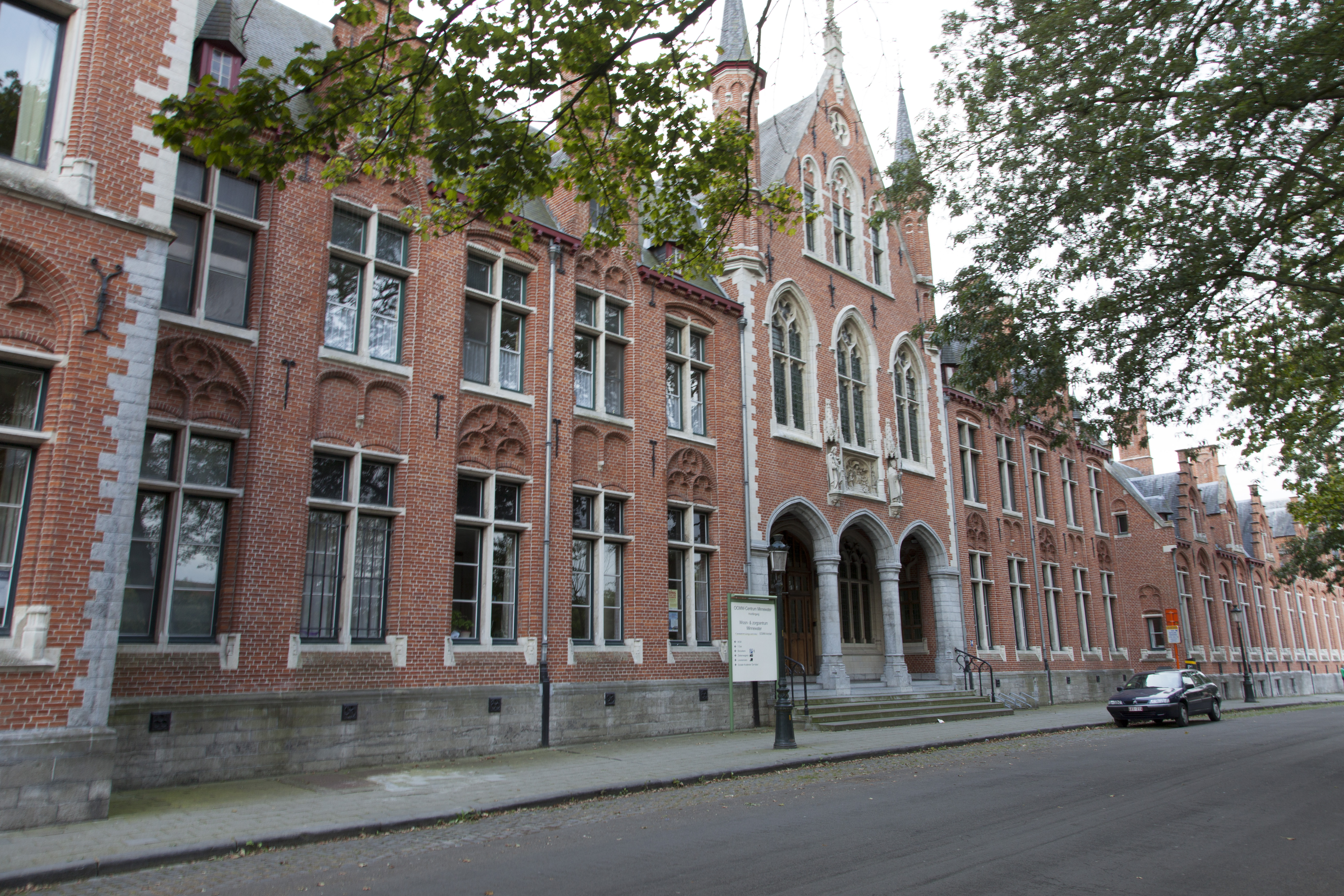 Brugge - Prof Dr J Sebrechtstraat 1 - Huize Minnewater